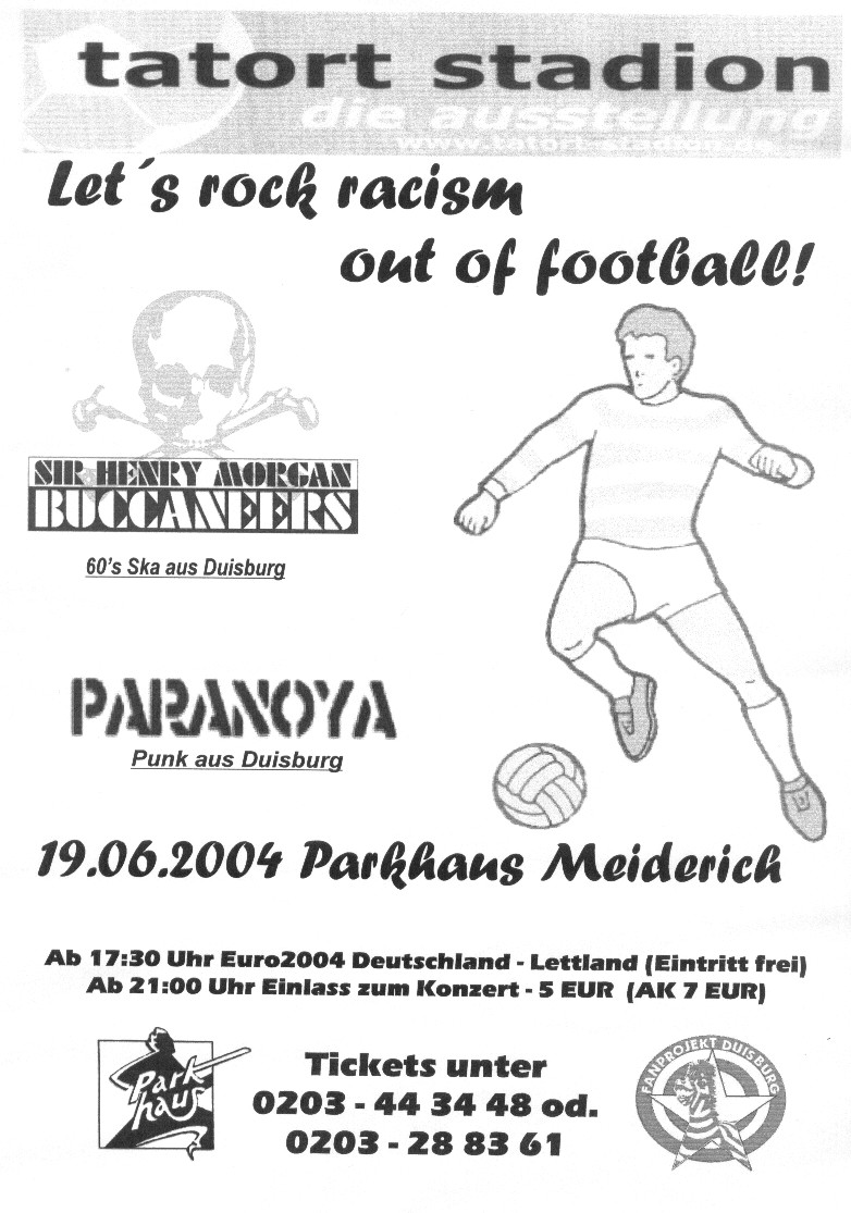 Konzertplakat zur Tatortstadionausstellung 2004